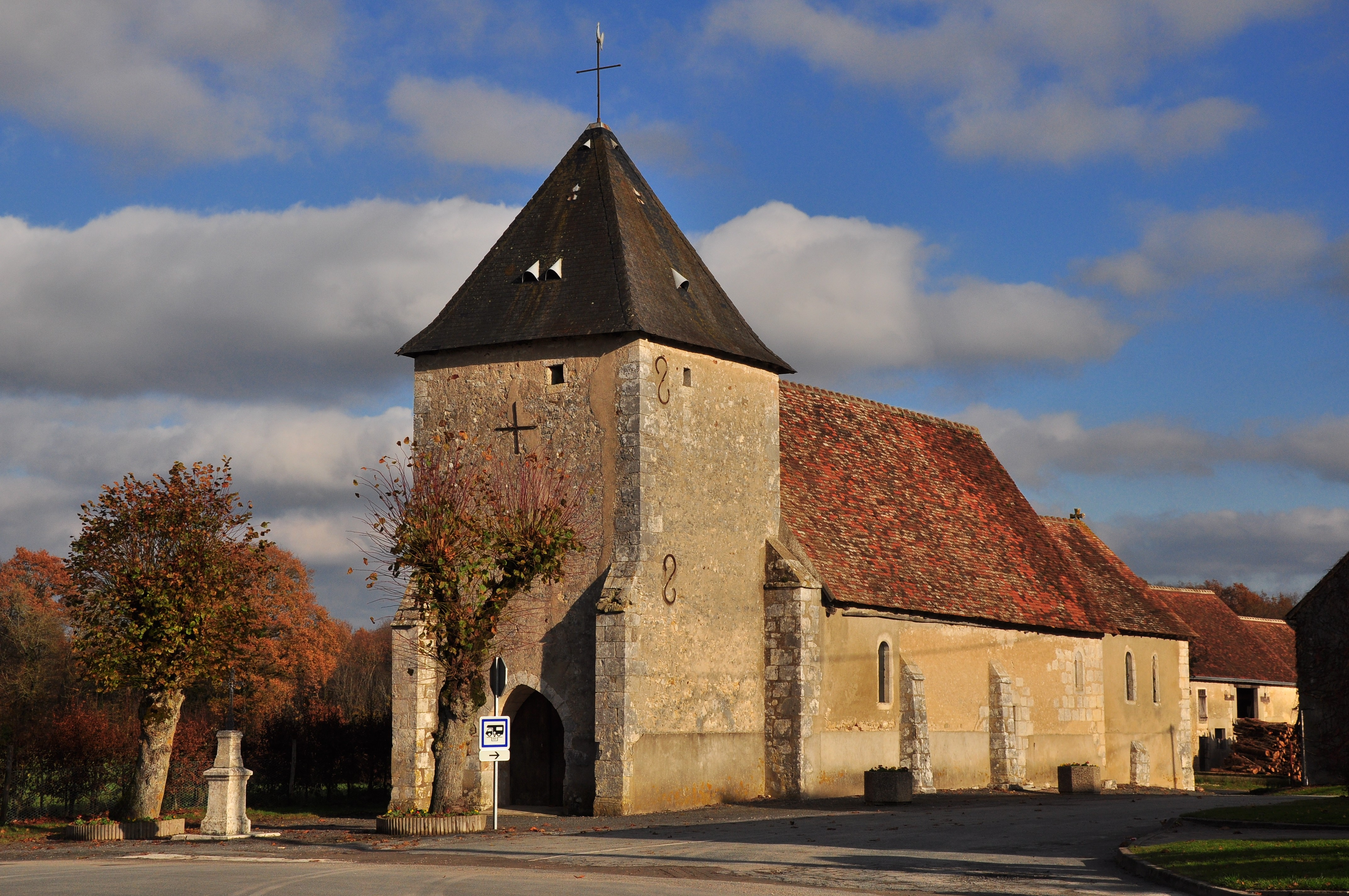 La Pérouille (Indre) - Eglise